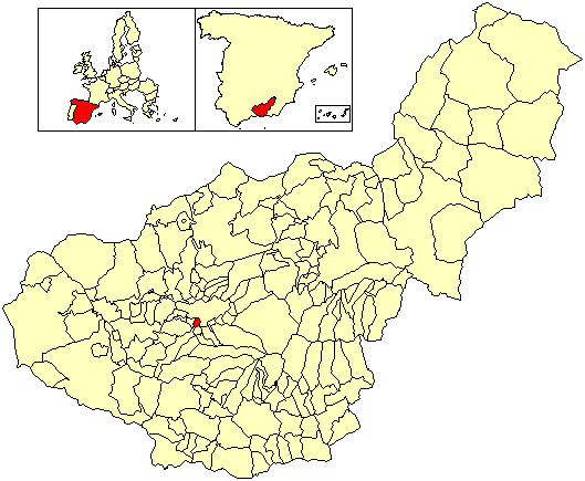 Situación del término municipal de Armilla respecto a la provincia de Granada, en España.